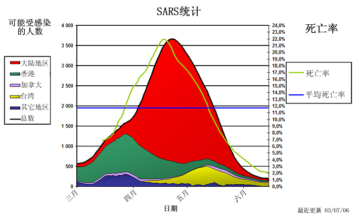 SARS統計。